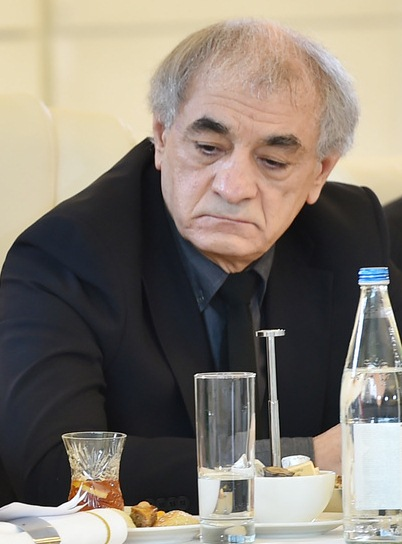 Azərbaycanın mədəniyyət və incəsənət xadimlərinin bir qrupunun Azərbaycan Respublikasının Prezidenti İlham Əliyev və birinci xanım Mehriban Əliyeva ilə görüşündə şəkilmiş foto